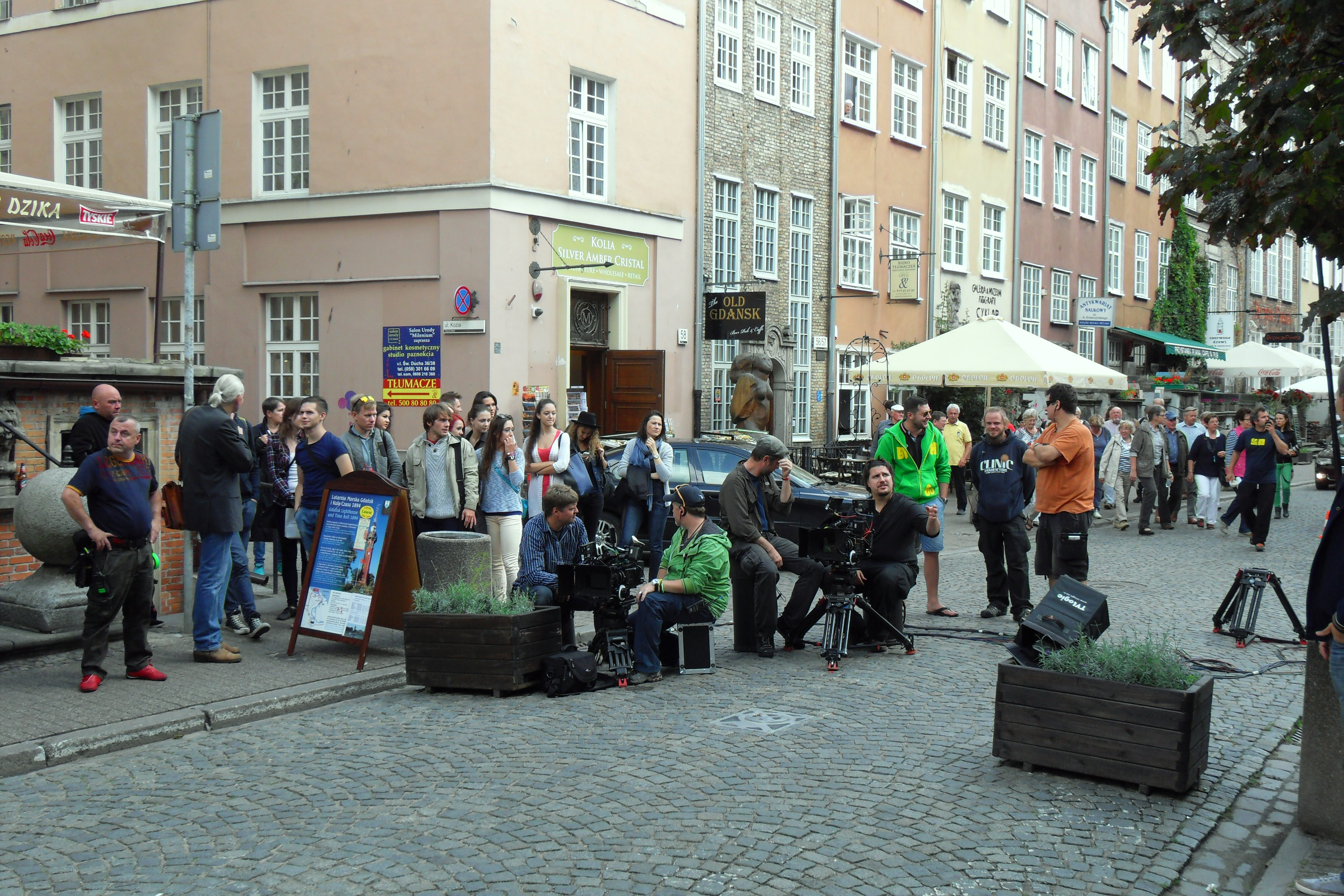 Plan filmowy serialu "Prawo Agaty", Gdańsk Główne Miasto, ul. Piwna. Ekipa filmowa i statyści.